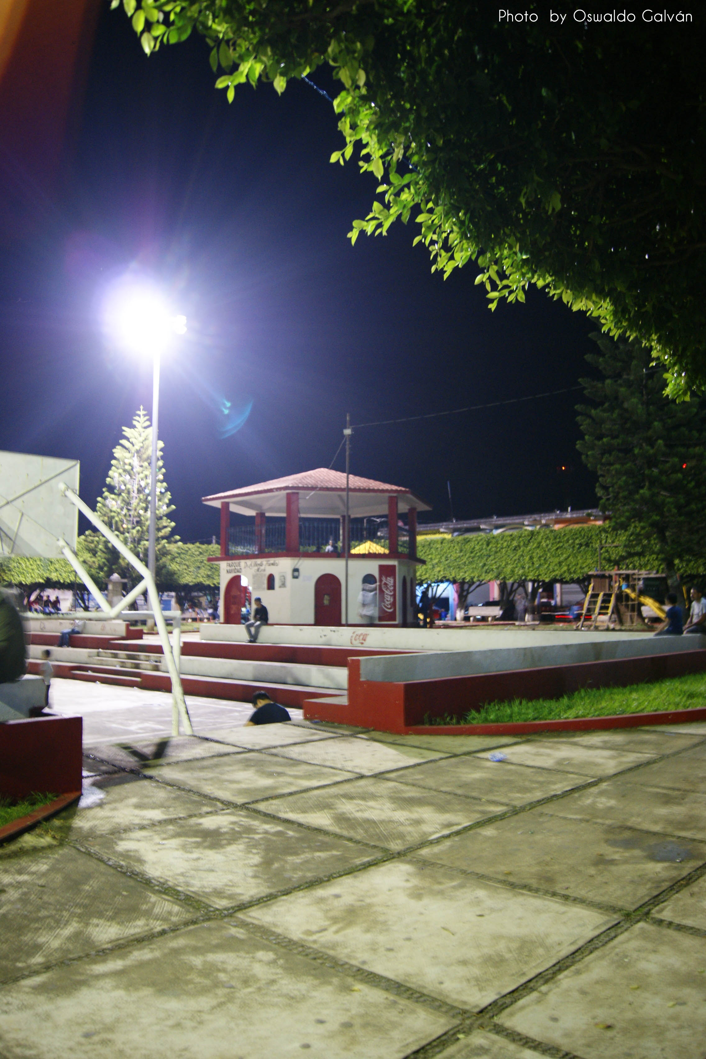 Parque Central de Flores Costa Cuca